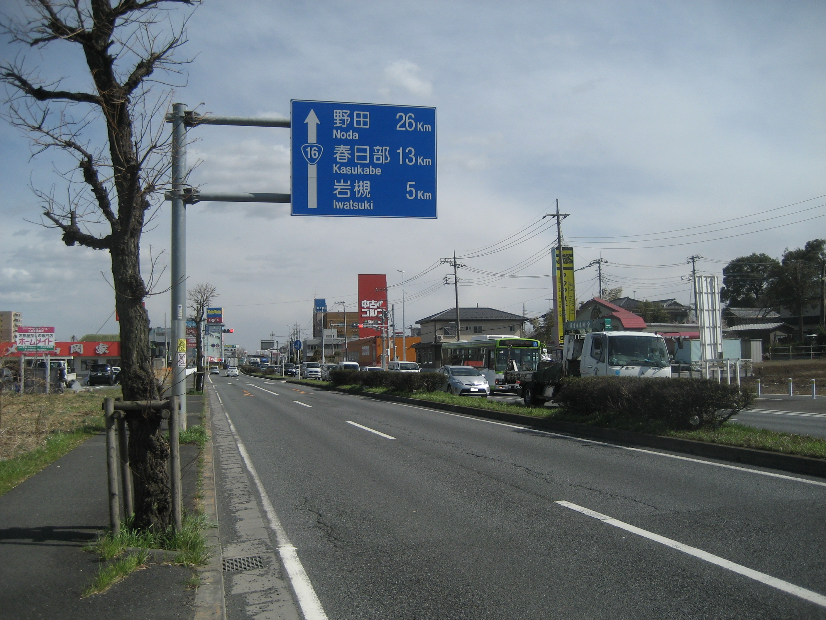 国道16号線（東大宮バイパス）さいたま市見沼区丸ケ崎東交差点付近